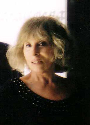 Portrait de l'artiste